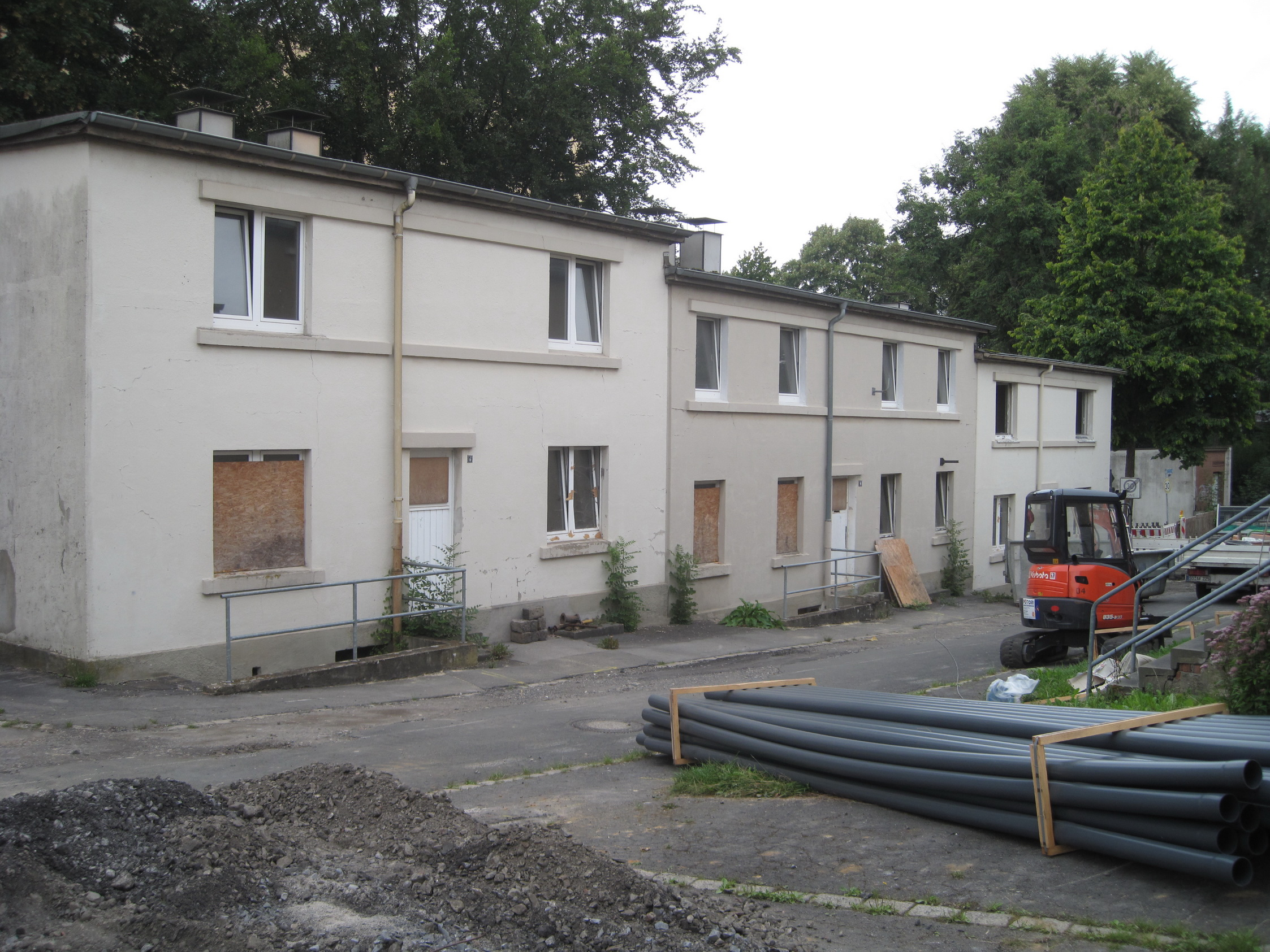 Sanierungsarbeiten im Schlieperblock in Iserlohn, Meisenweg, Häuserzeile 6, 4 und 2. This image shows a heritage building in Germany, located in the North Rhine-Westphalian city Iserlohn (no. 230).